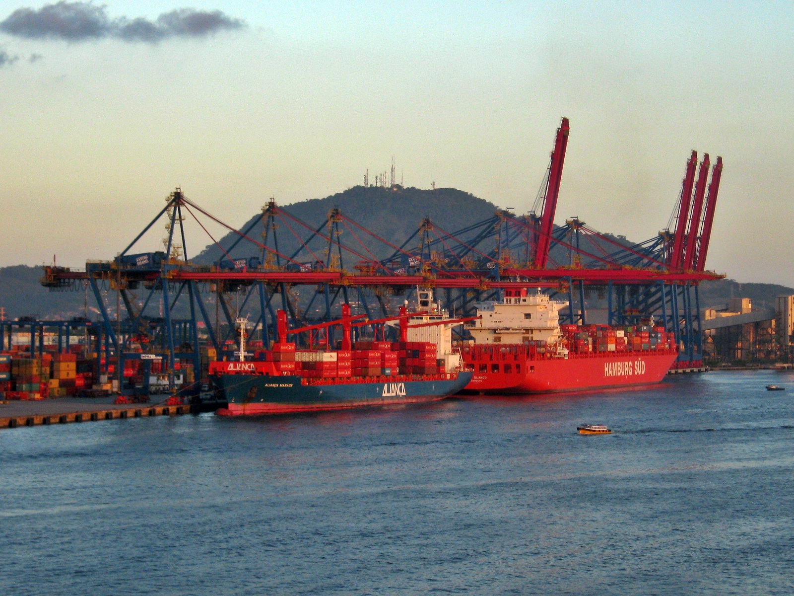 Esta foto do Porto de Santos, em Santos, São Paulo, Brasil, foi tirada em 5 de fevereiro de 2010 usando uma Canon PowerShot A480.